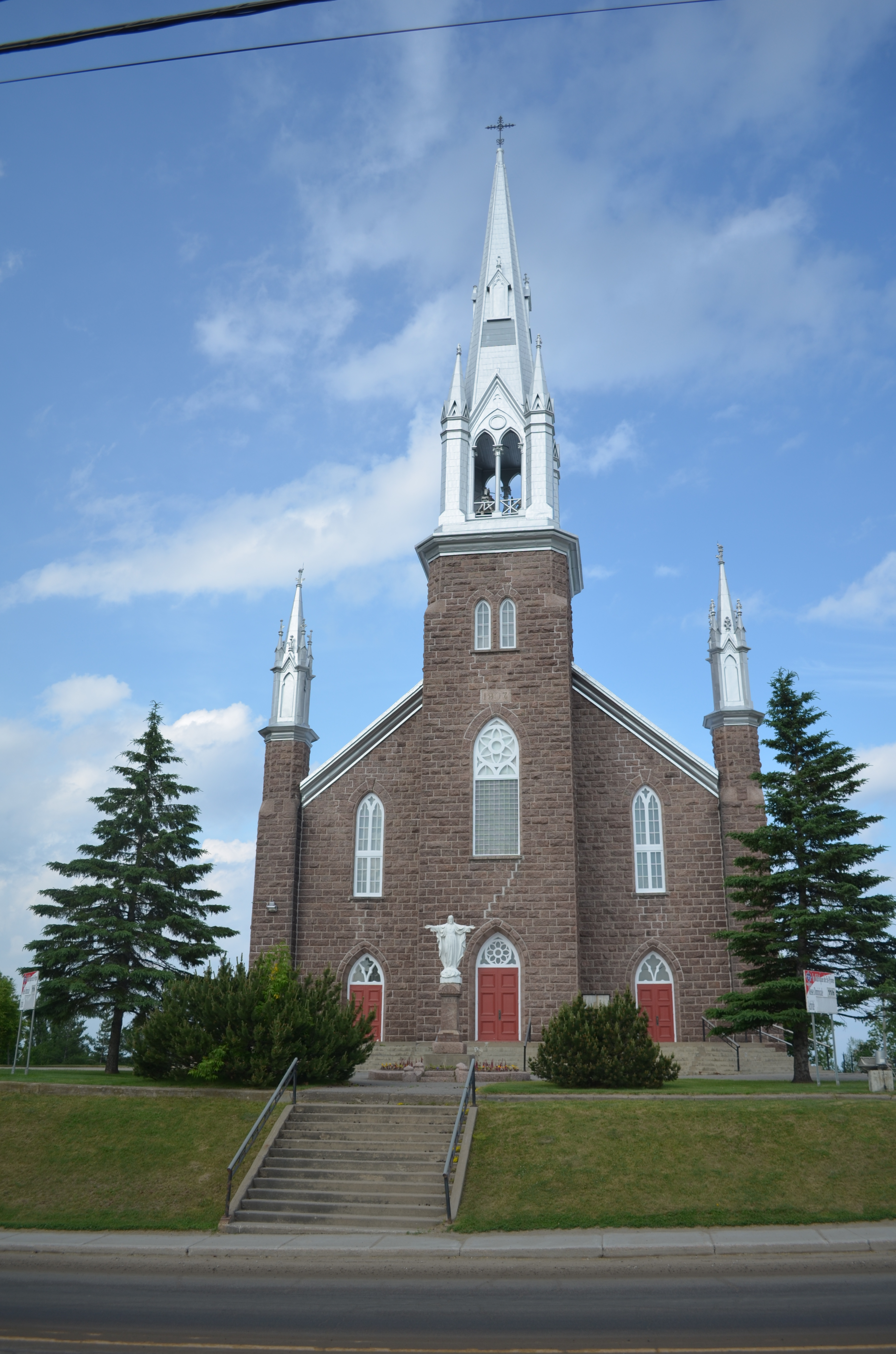 L'église de Saint-Prime